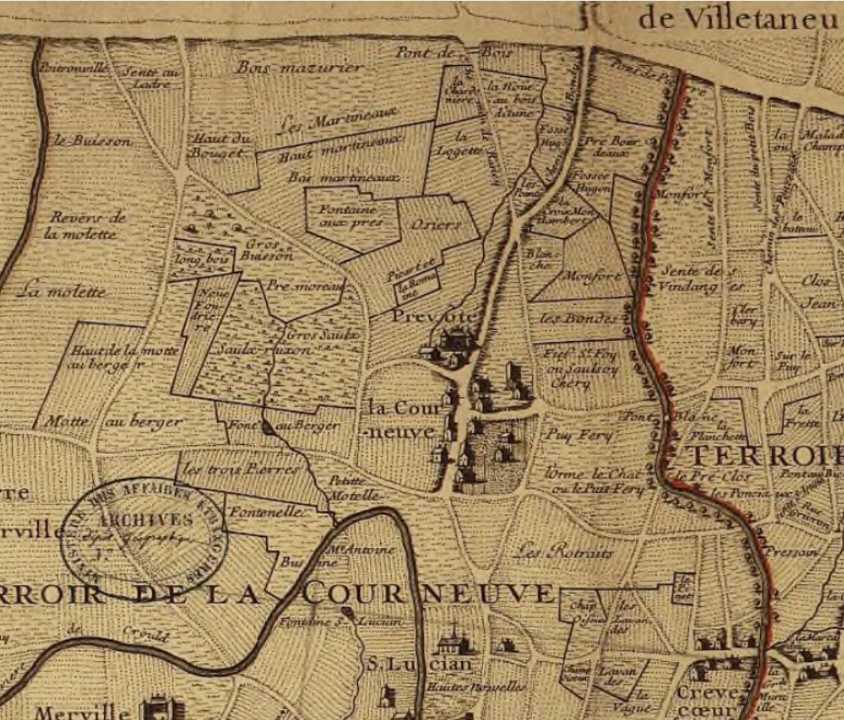 Plan partiel tiré du plan du terroir de St Denis en France et des paroisses alentours comprenant le terroir de La Courneuve